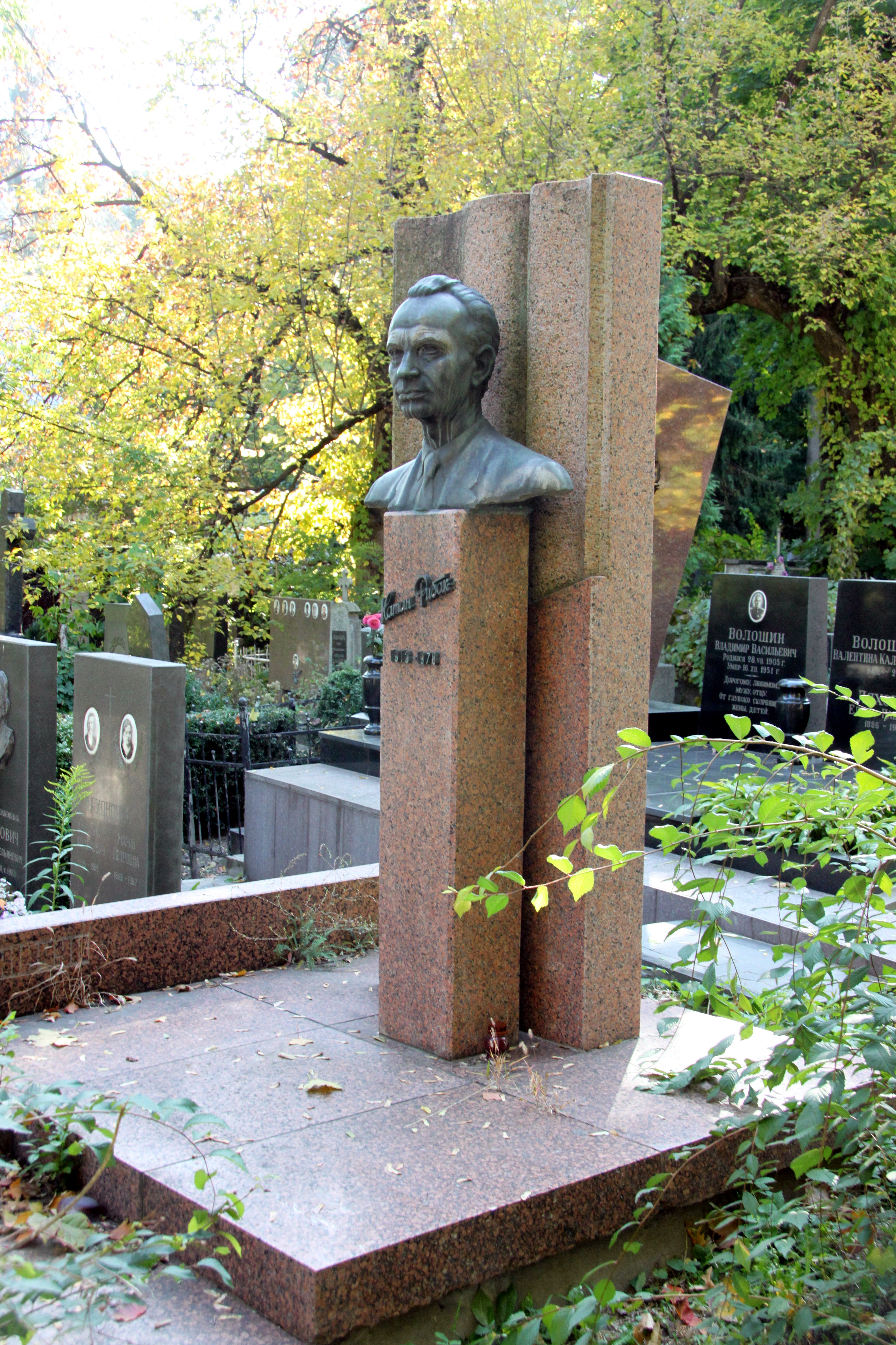 Могила Рибака Н. С., письменника, Байкова вул., 6, Київ